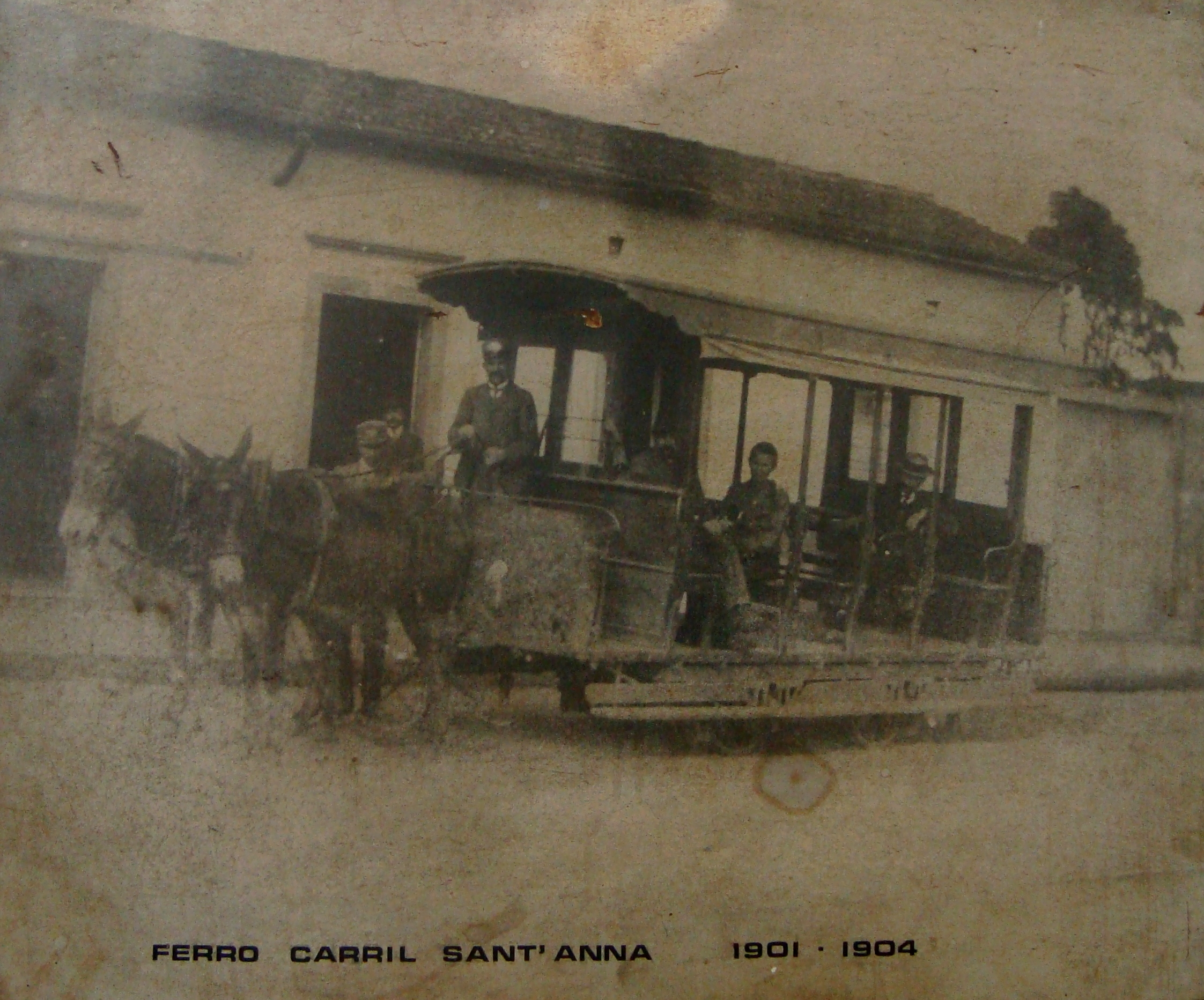 Foto do começo do século XX, bondes de tração animal. A foto está exposta no Museu do Transporte Público Gaetano Ferolla, bairro do Canindé, São Paulo/SP